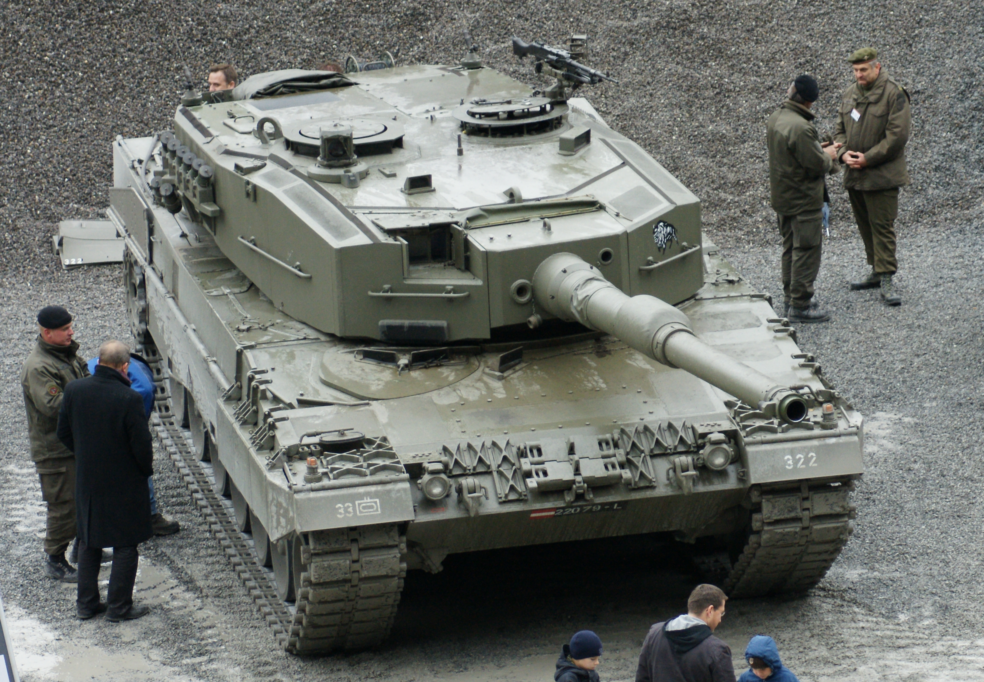 Im Zuge einer Road-Show zeigte das Österreichische Bundesheer im Dornbirner / Hohenemser Steinbruch den Kampfpanzer Leopard 2A4. Er ist das Hautwaffensystem der österreichischen Panzertruppe. Als Hauptwaffe verfügt der Panzer über eine 120 Millimeter Kanone. Die starke Motorisierung sorgt trotz der starken Panzerung für die enorme Beweglichkeit des Fahrzeuges.